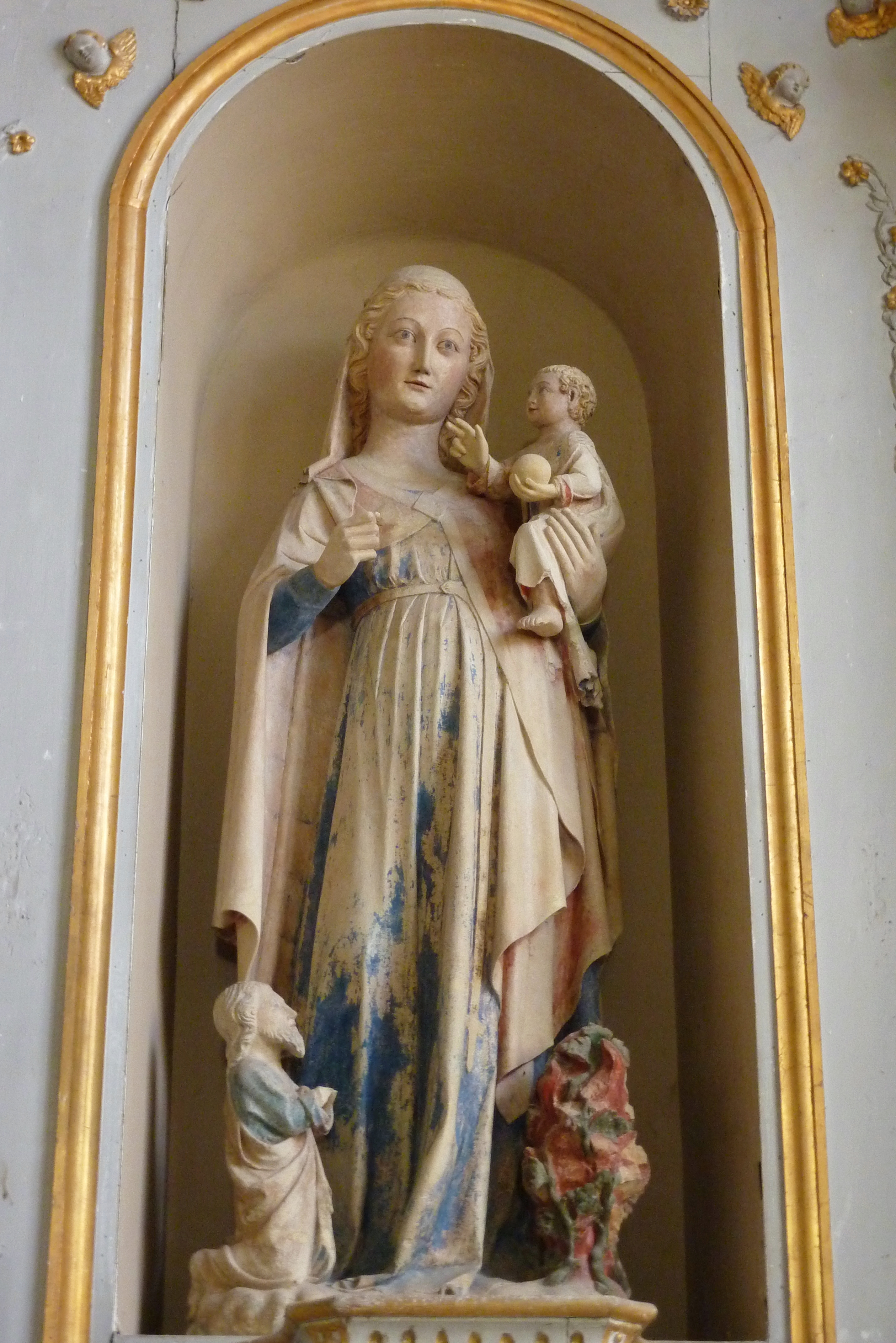 Marienskulptur aus dem 14. Jahrhundert in der katholischen Kirche Saint-Martin in Survilliers, einer Gemeinde im Canton de Luzarches (Île de France), zu Füßen Maria Moses (kniend) und der brennende Dornbusch